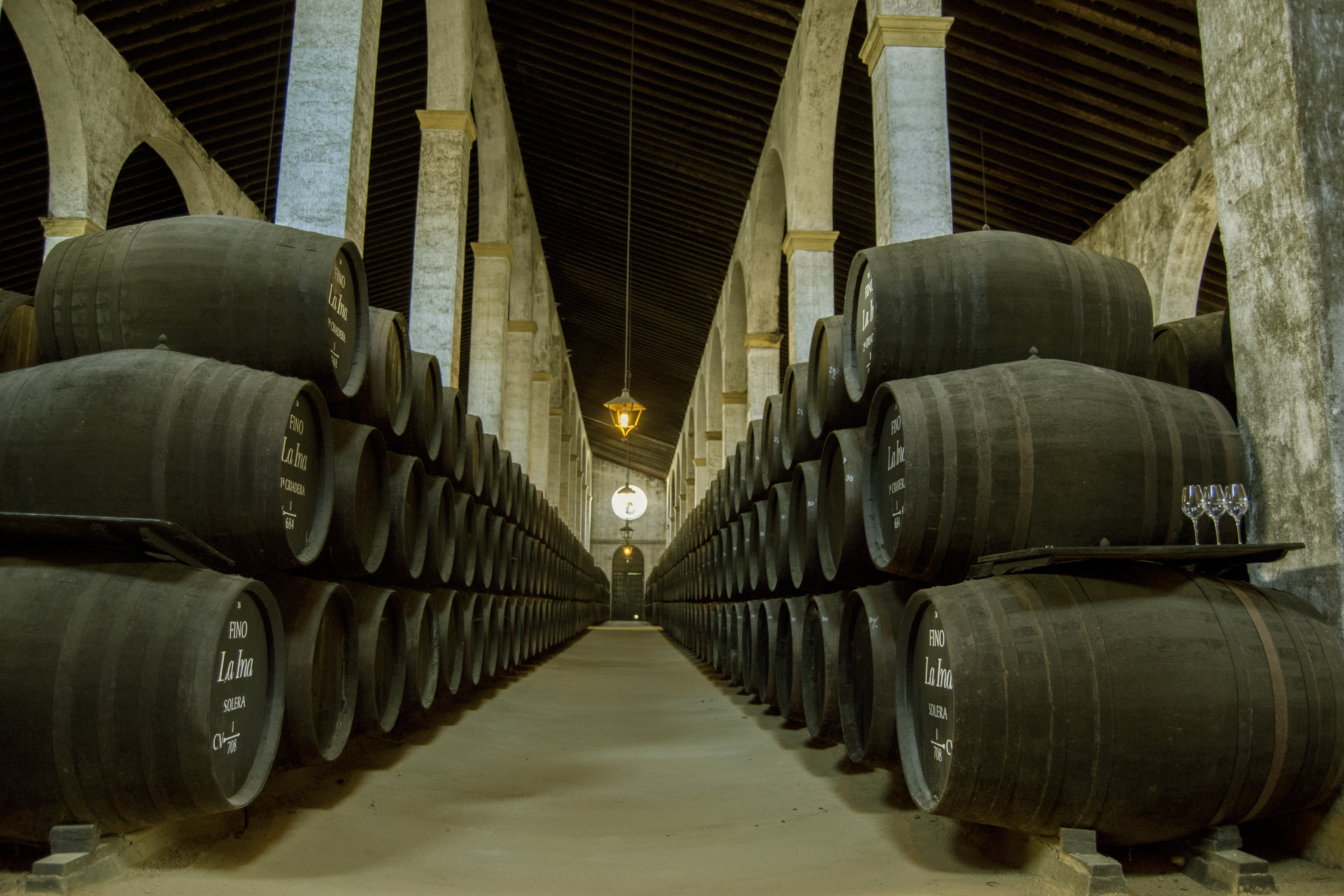 Interior de las bodegas Lustau en Jerez de la Frontera.